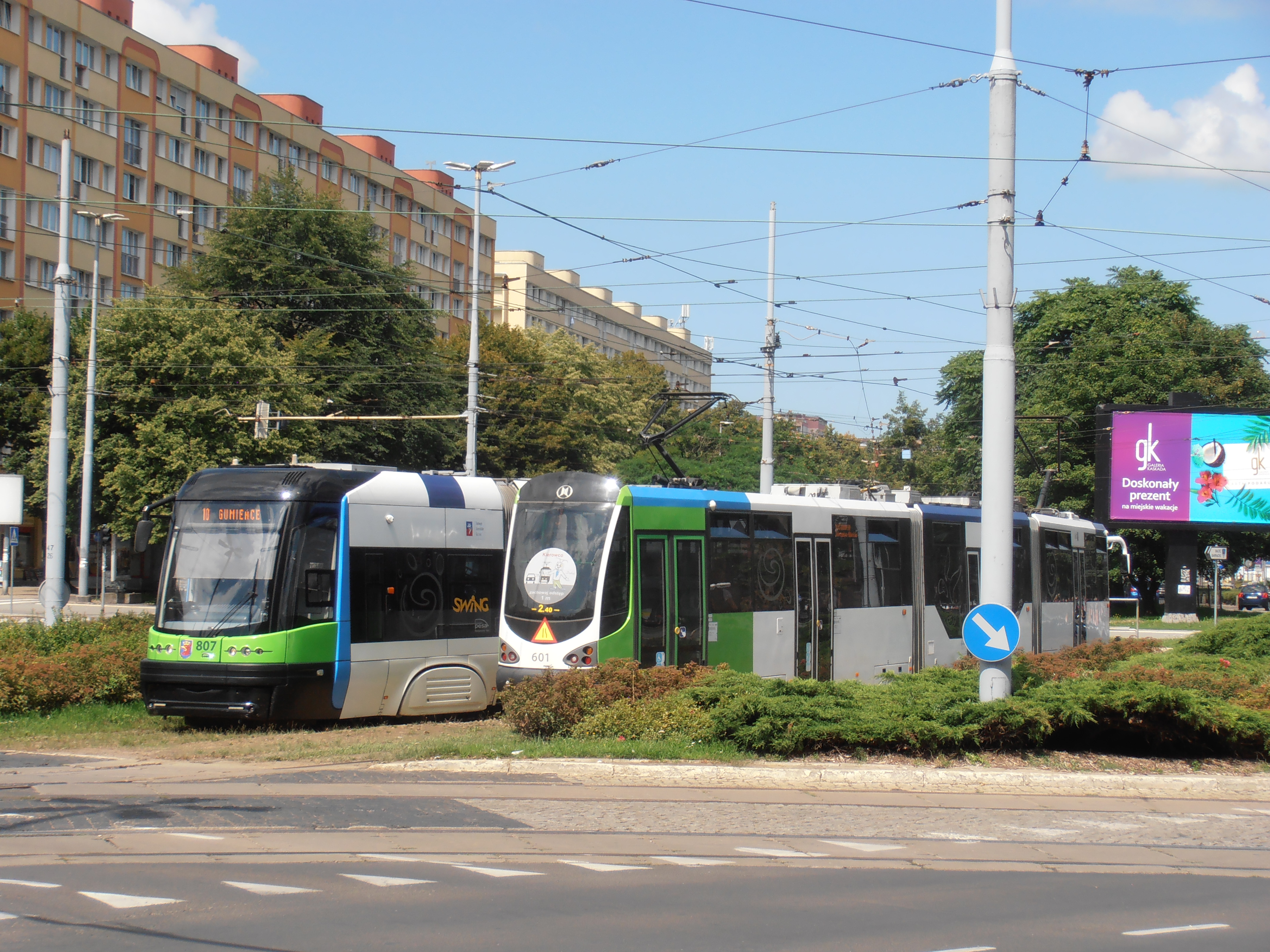 Tramwaje typu Pesa 120Na #807 oraz Moderus Beta #601 mijają się na pl. Rodła w Szczecinie, 2018 r.